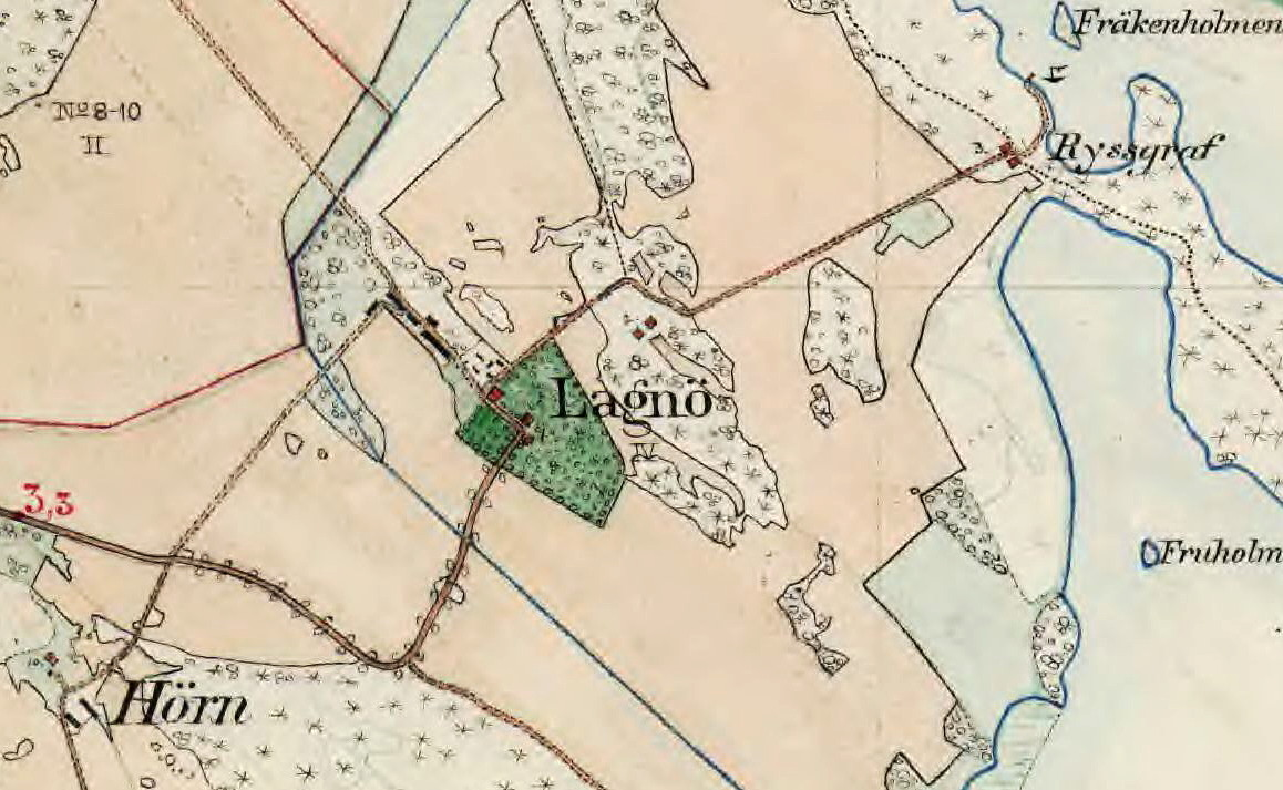 Lagnö gård på Häradsekonomiska kartan